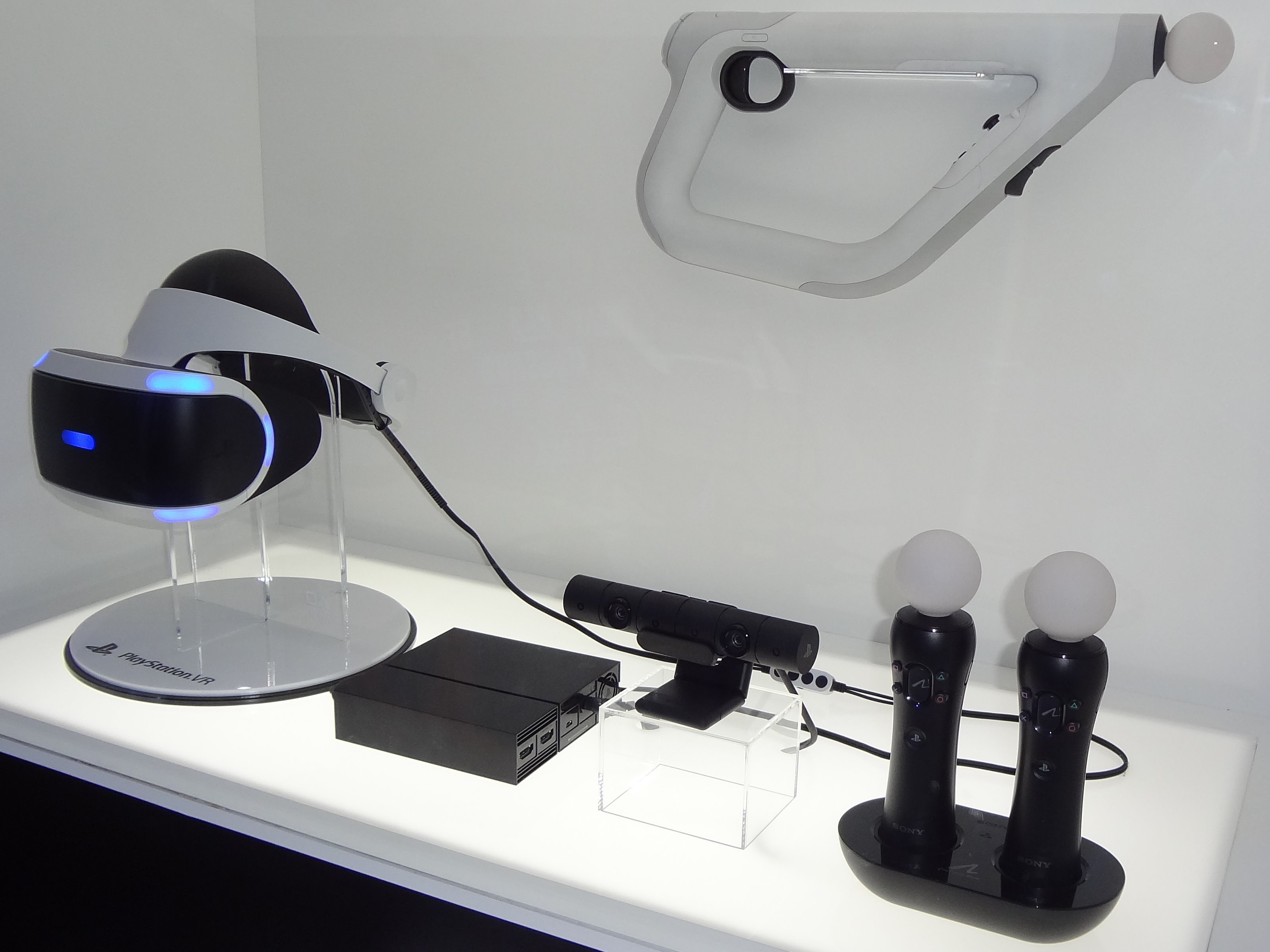 中文（台灣）: 2017臺北國際電玩展，台灣索尼互動娛樂攤位展示的PlayStation VR樣機。